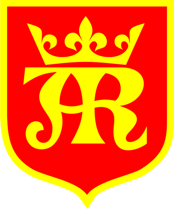 Herb Miasta Jasła w wersji żółto-czerwonej